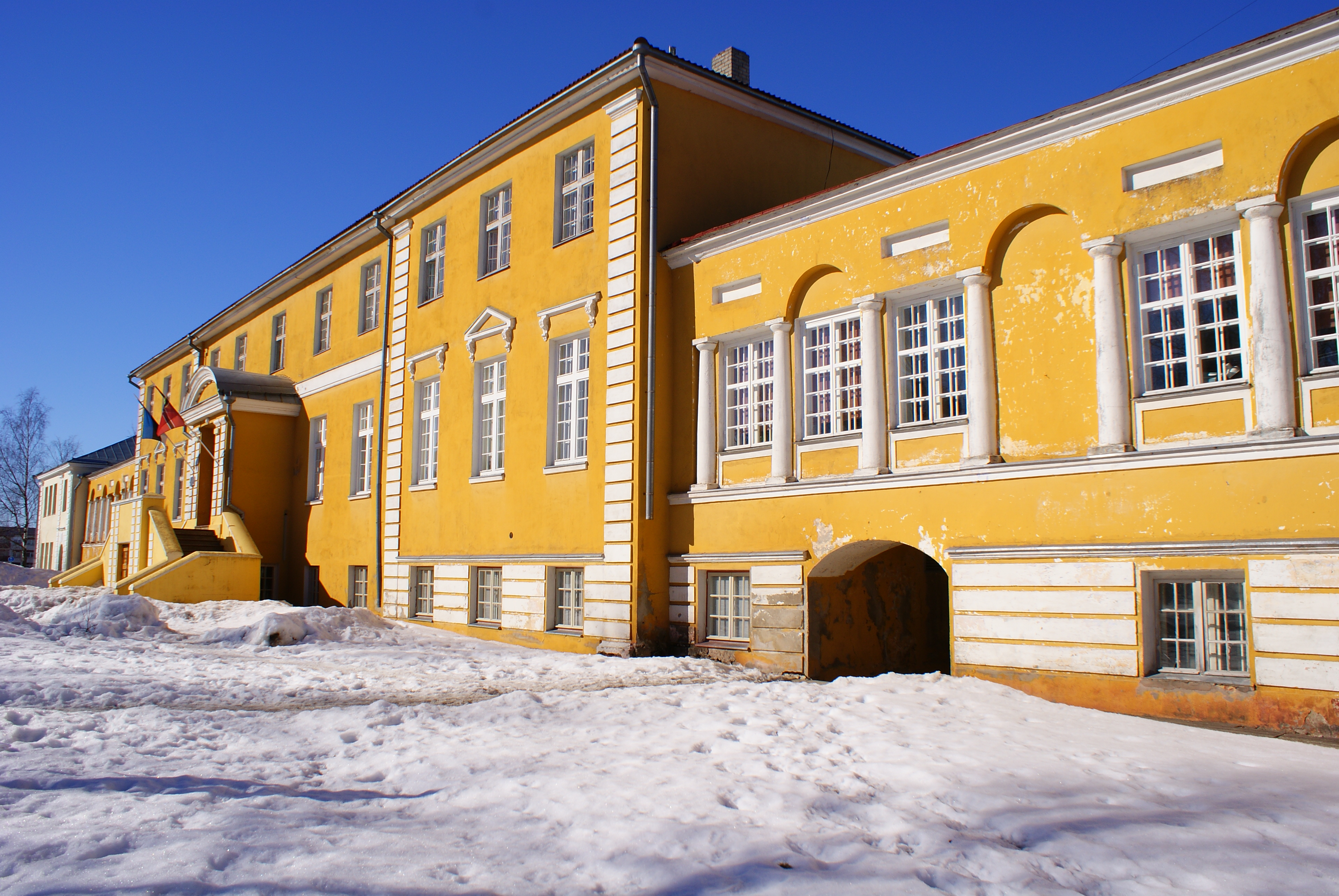 Uuemõisa mõisa peahoone